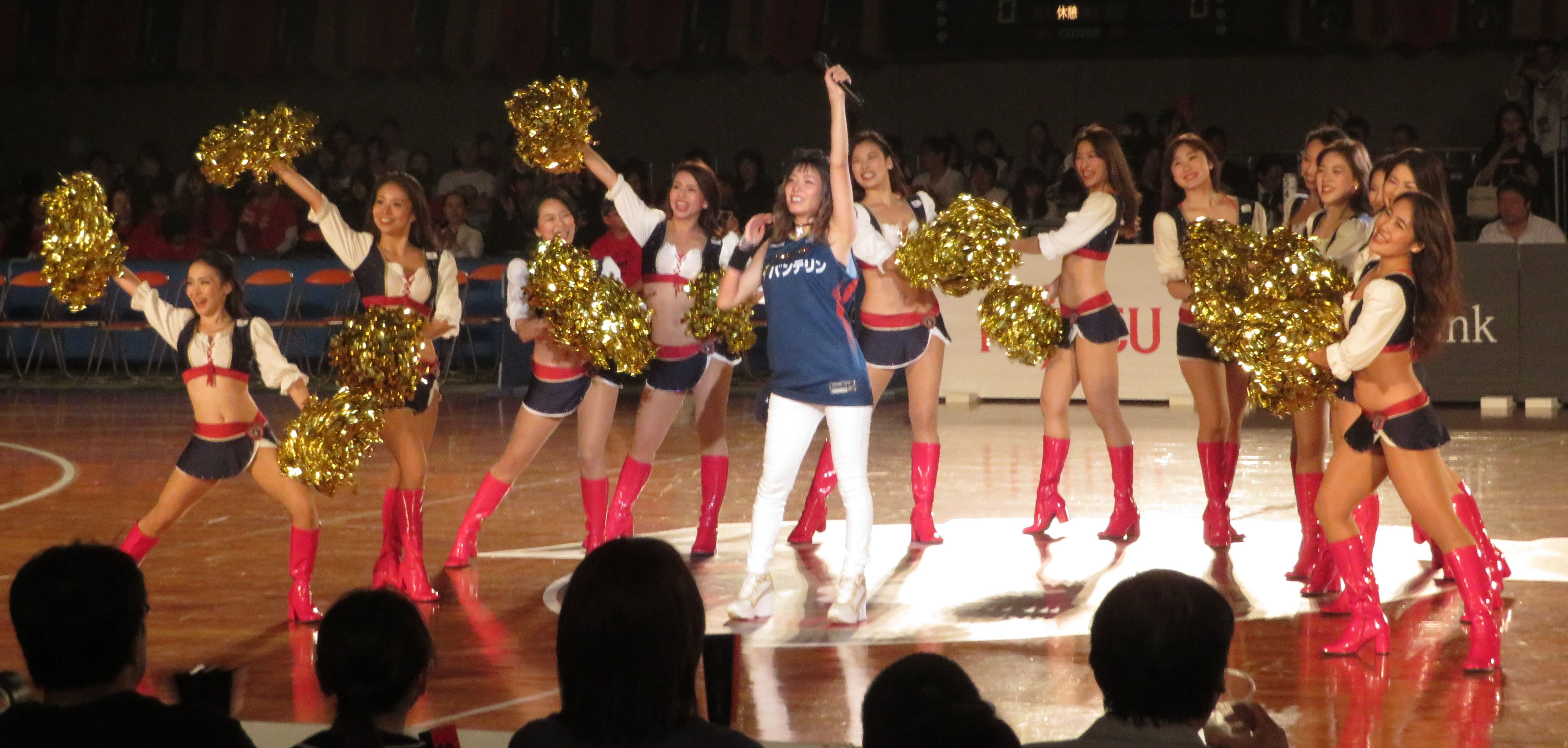 2018年10月18日撮影 2018-19 B1 第3節 横浜-富山 横浜文化体育館にて